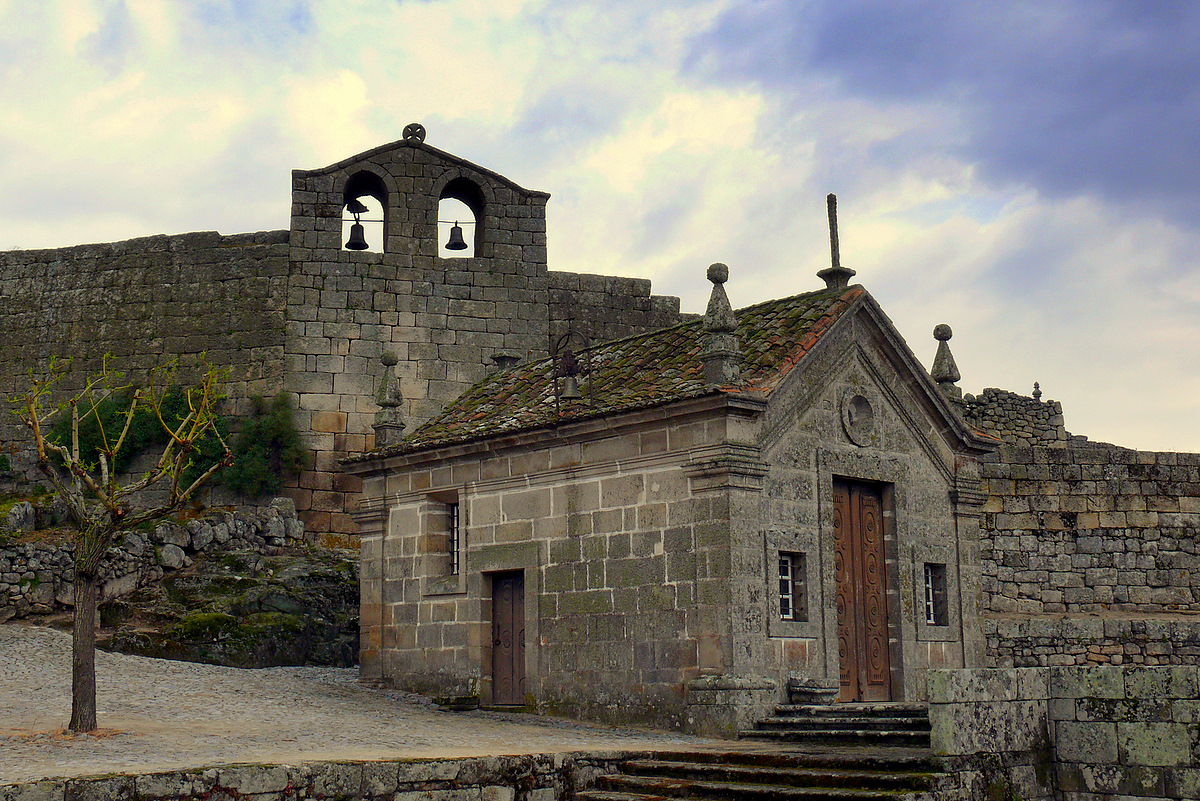 Muralhas e Igreja de Marialva This file was uploaded for Wiki Loves Monuments in Portugal with the unique identifier 69859.